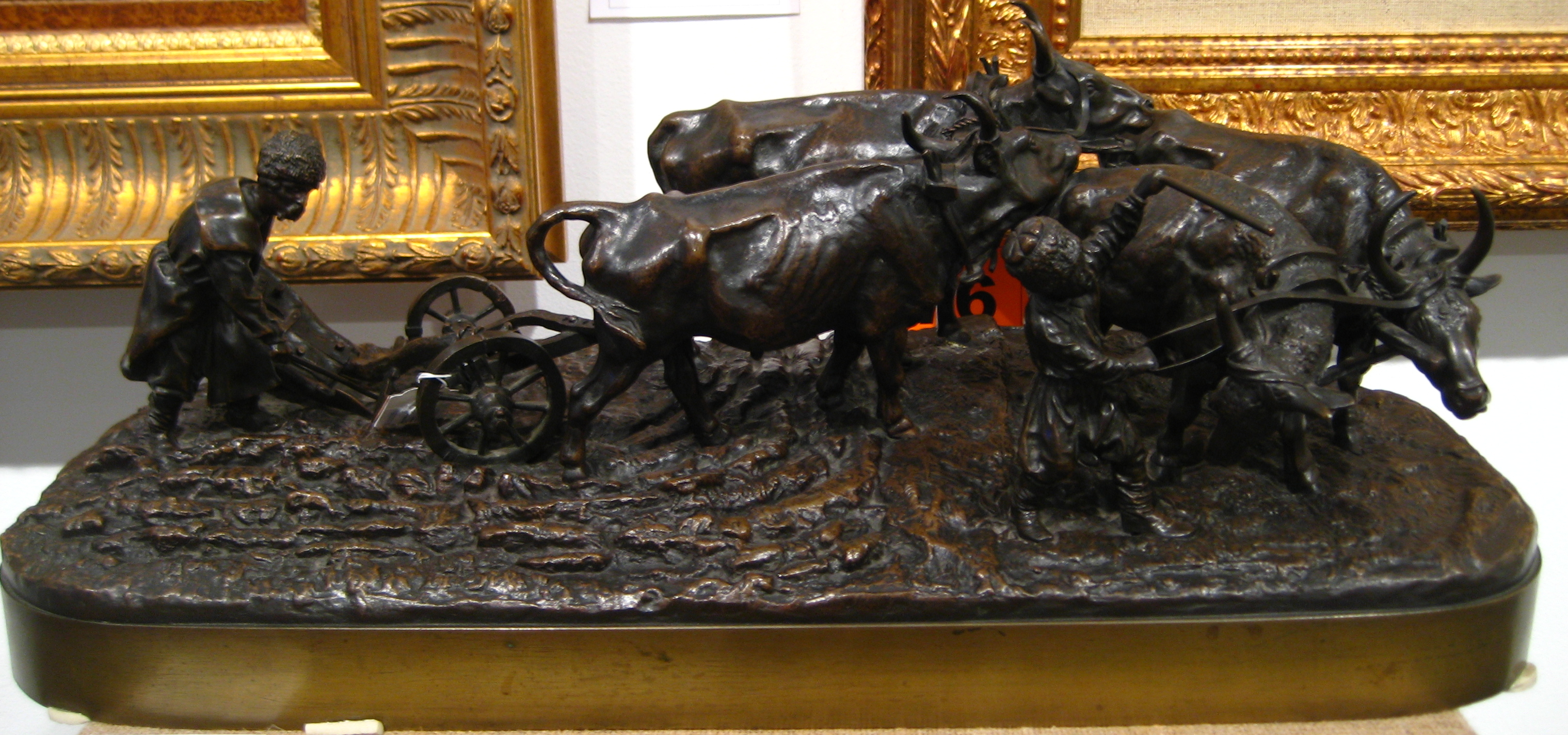 Скульптурная композиция "Плугать-малоросс". Скульптор Лансере Е.А. Модель 1877 года. Отливка - фабрика Ф.Ю. Шопена, 1880-е